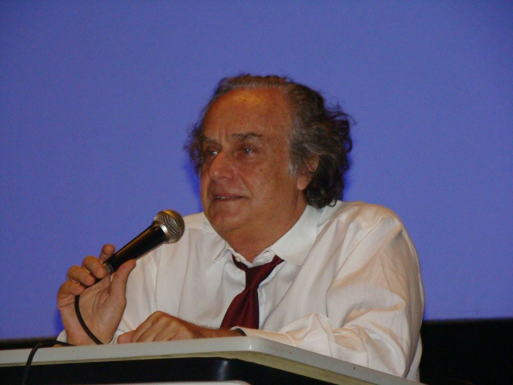 (portuguese) O jornalista e cineasta brasileiro Arnaldo Jabor